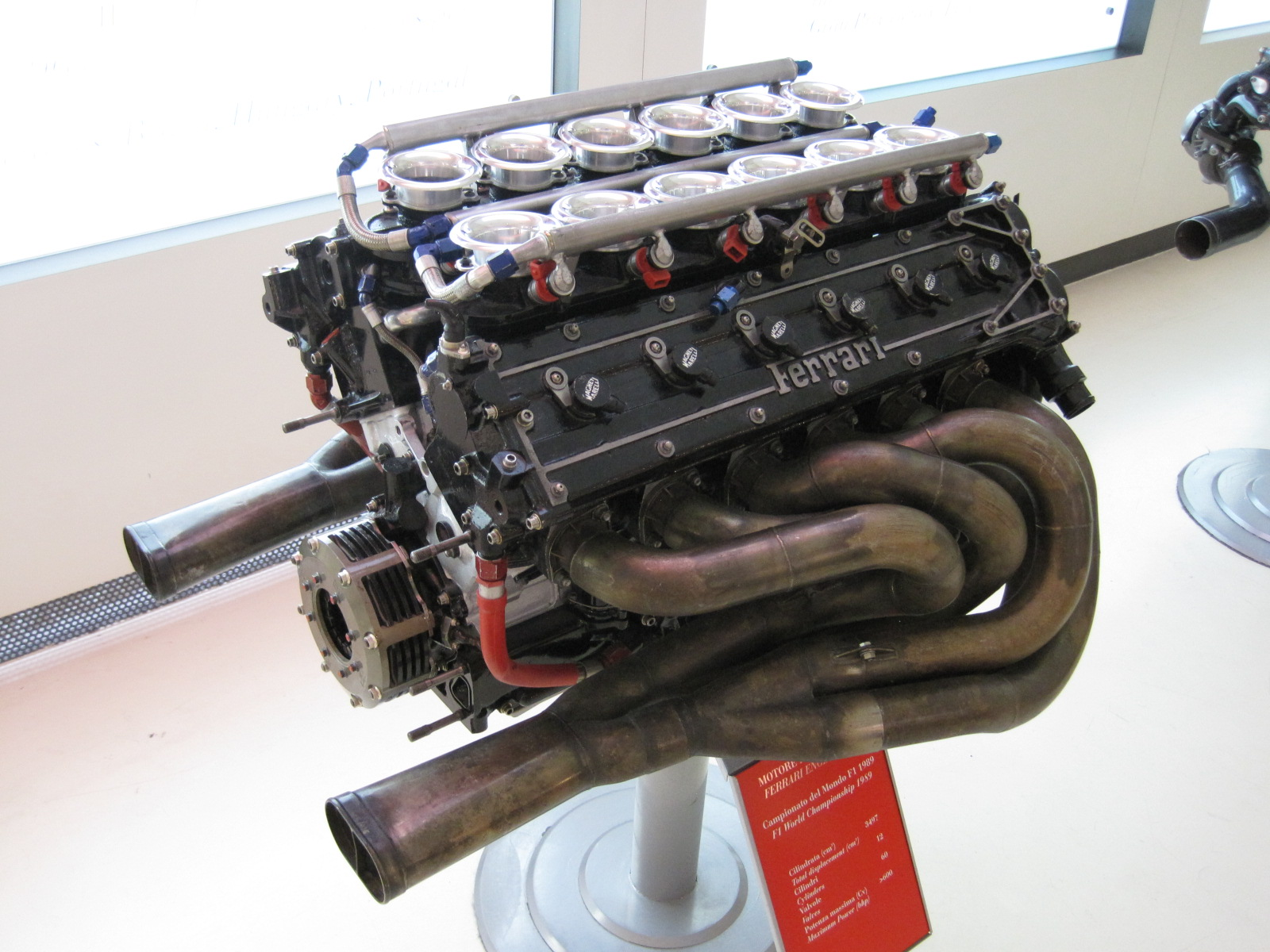 Collections of the Galleria Ferrari - Moteur Ferrari F1 035/5 du championnat du monde 1989 - 12 cylindres 3,4 litres